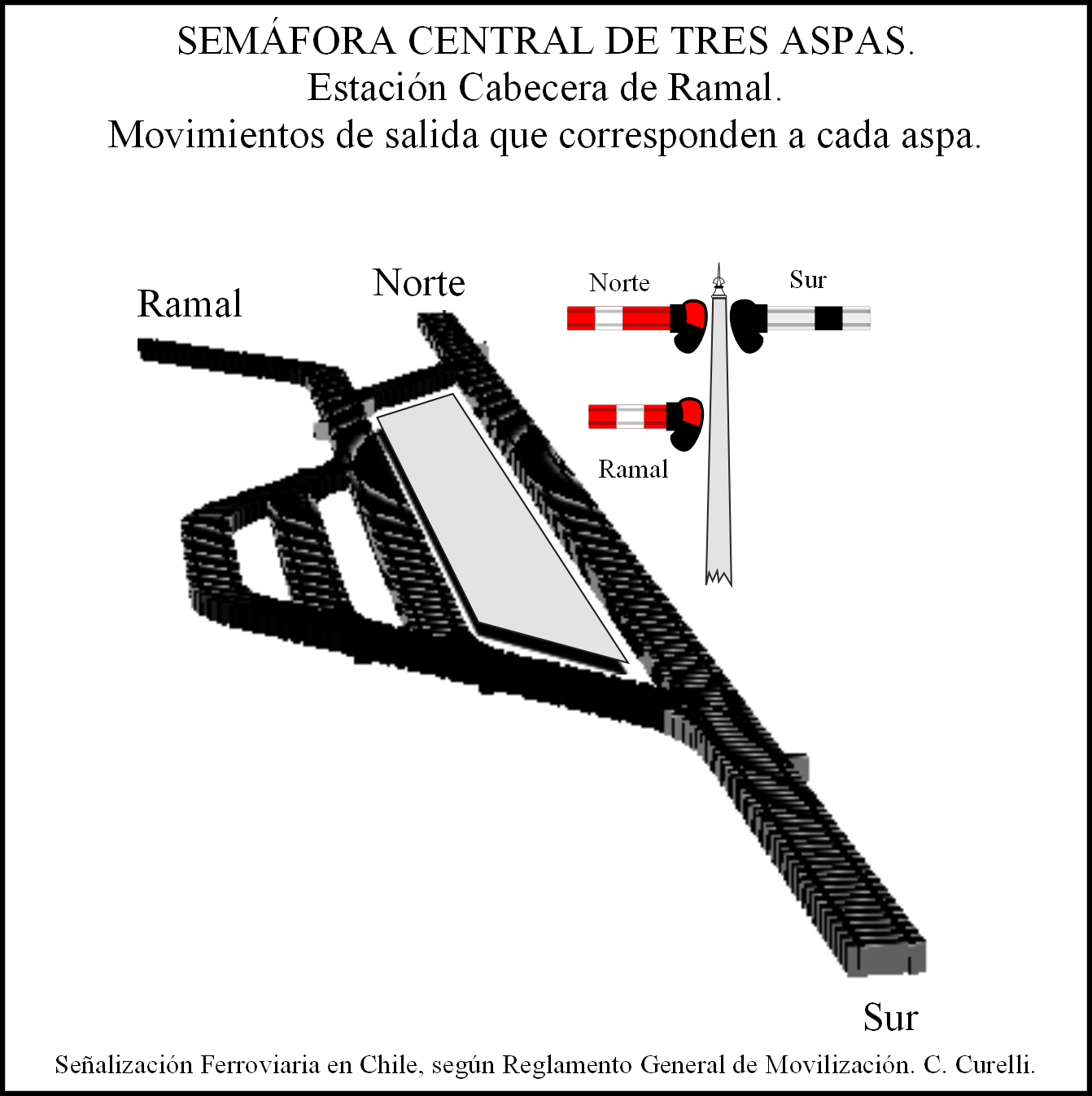 Semáfora central de tres aspas en estación cabecera de ramal. Correspondencias entre las aspas y los block.